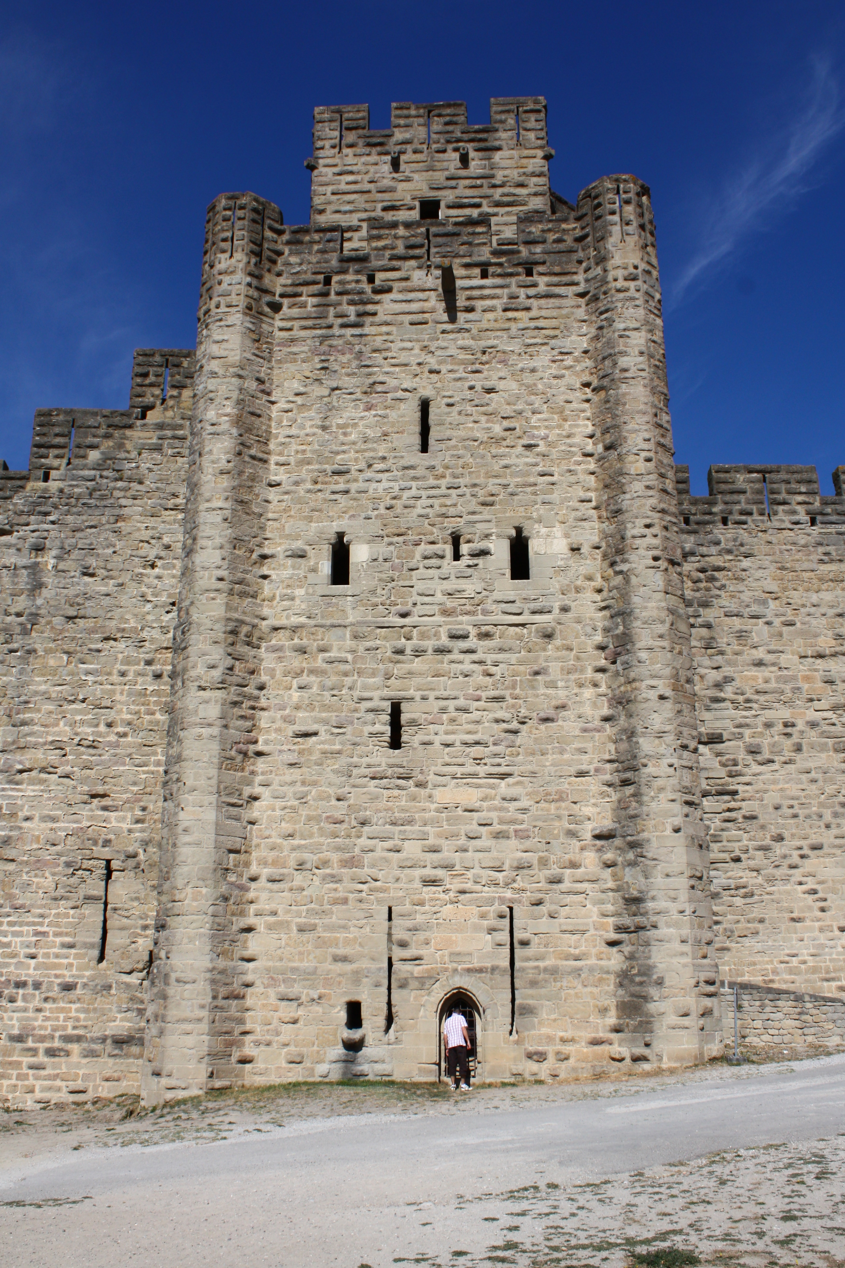 Carcassonne